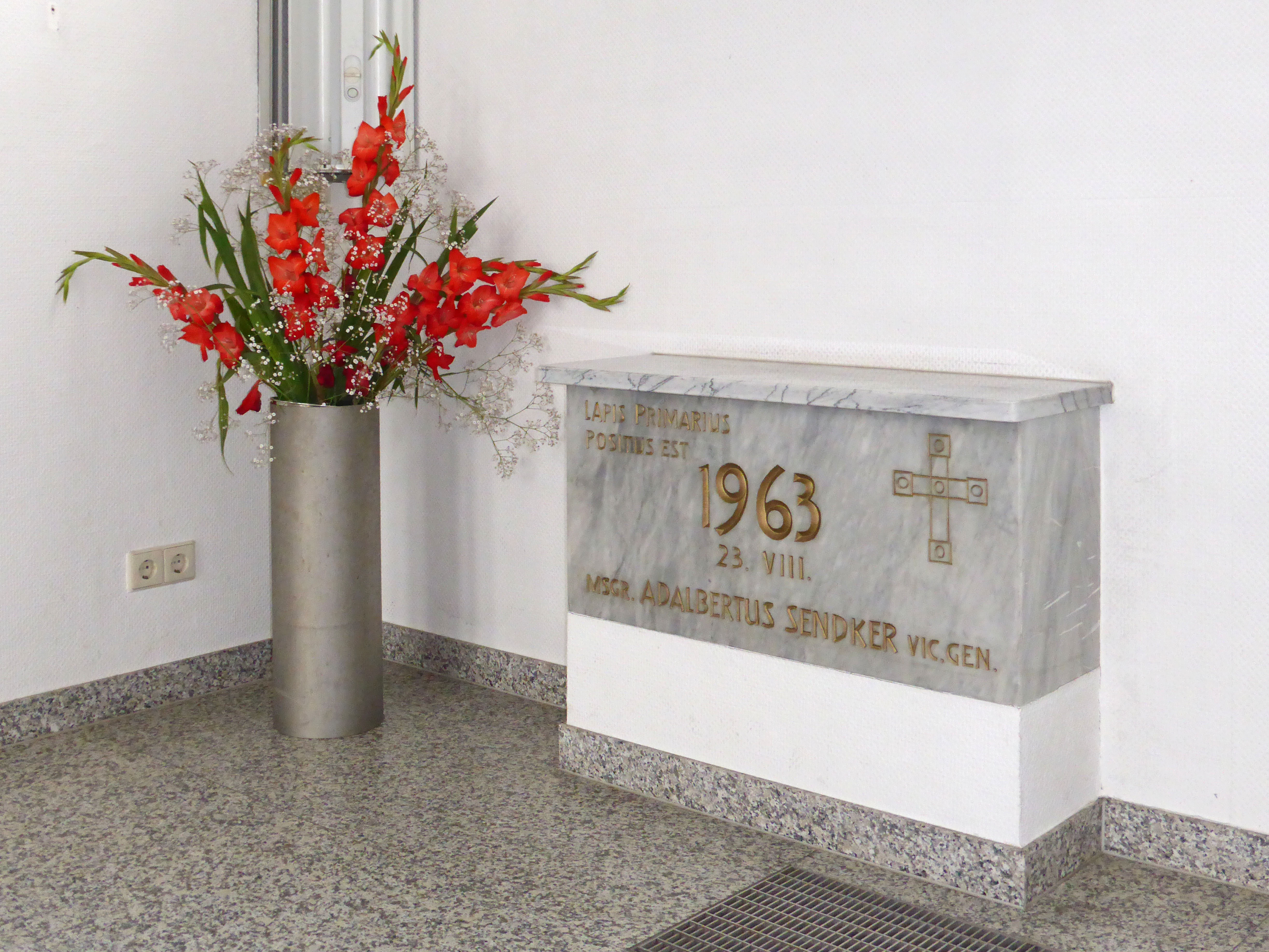 Grundstein der St.-Bernward-Kirche in Wolfsburg mit Blumenschmuck.